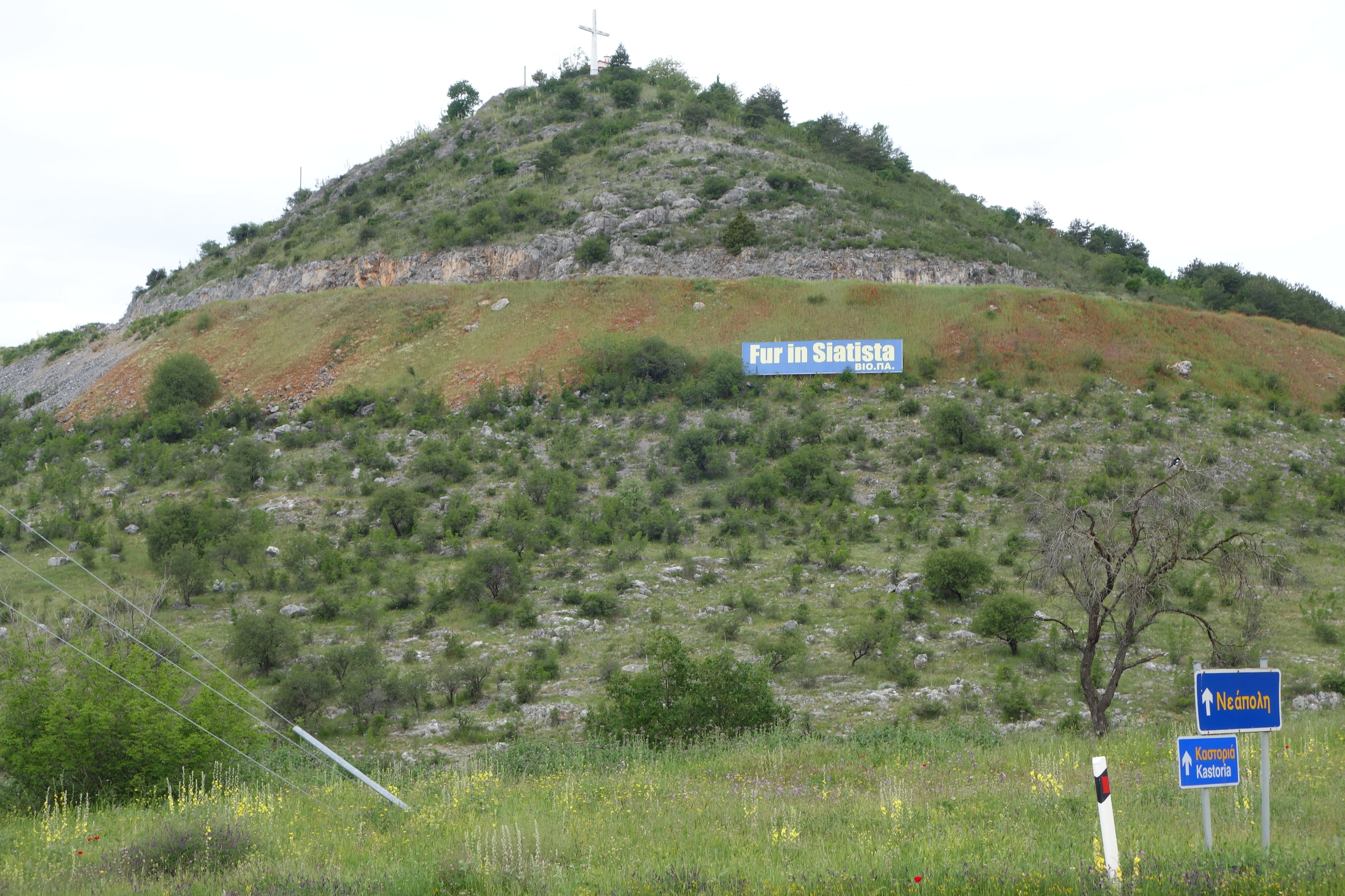 Kürschner in der Stadt Siatista, Griechenland. „Fur in Siatista“ (Pelz in Siatista). Begrüßung am Ortseingang von Siatista. Siehe auch Kürschner in der Präfektur Kastoria und Kürschner in der Stadt Kastoria.